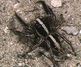 male Plexippus paykulli from Okinawa.